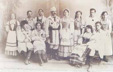 трупа Буйніцкага